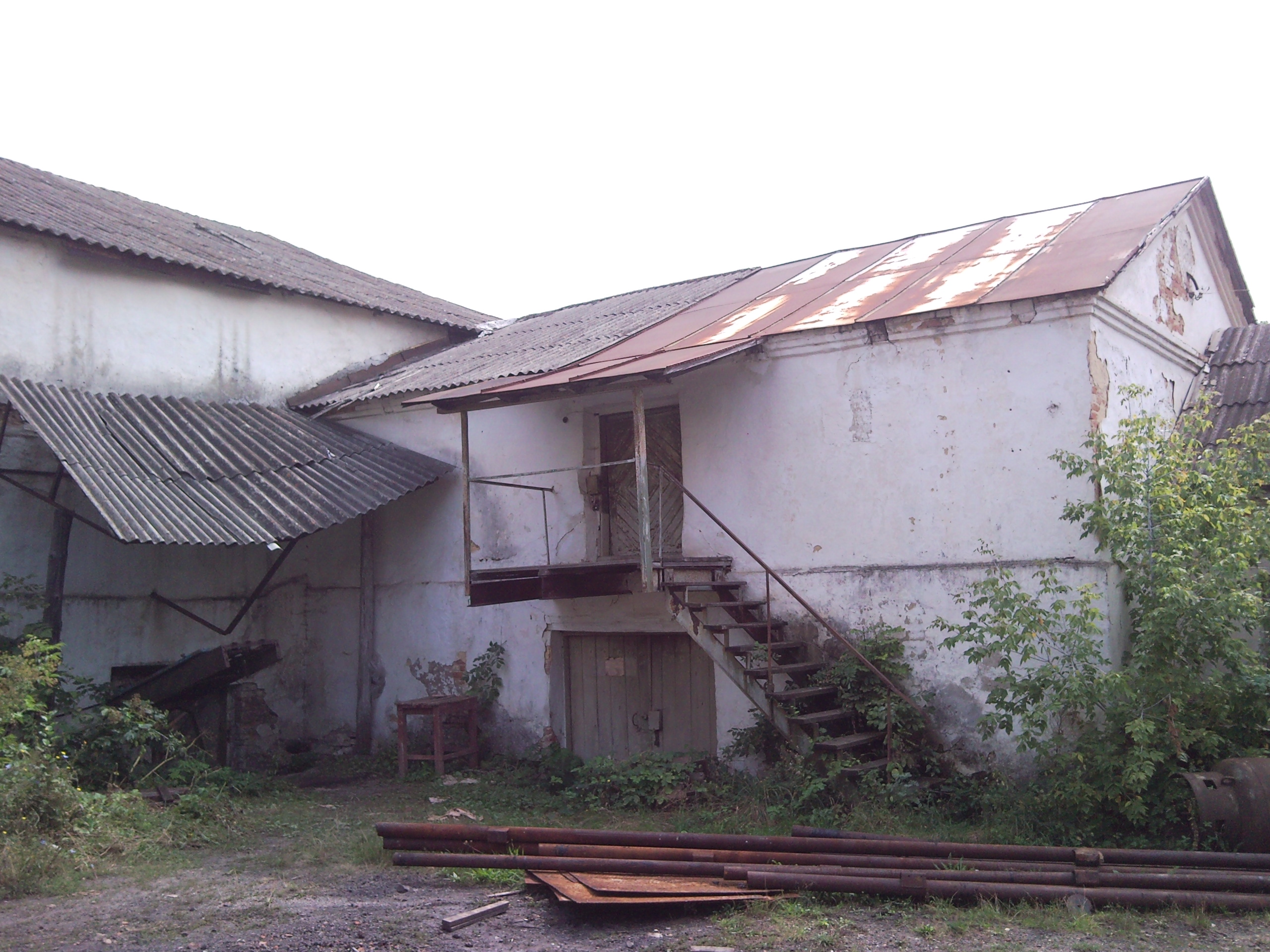 Шершні Плодоконсервний завод